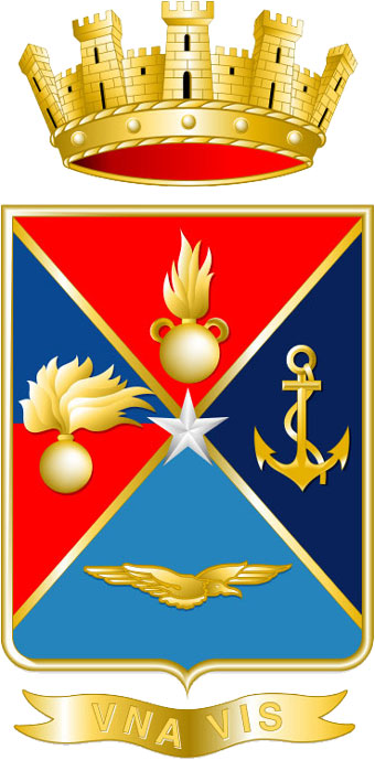 Stemma araldico dello Stato Maggiore della Difesa italiano